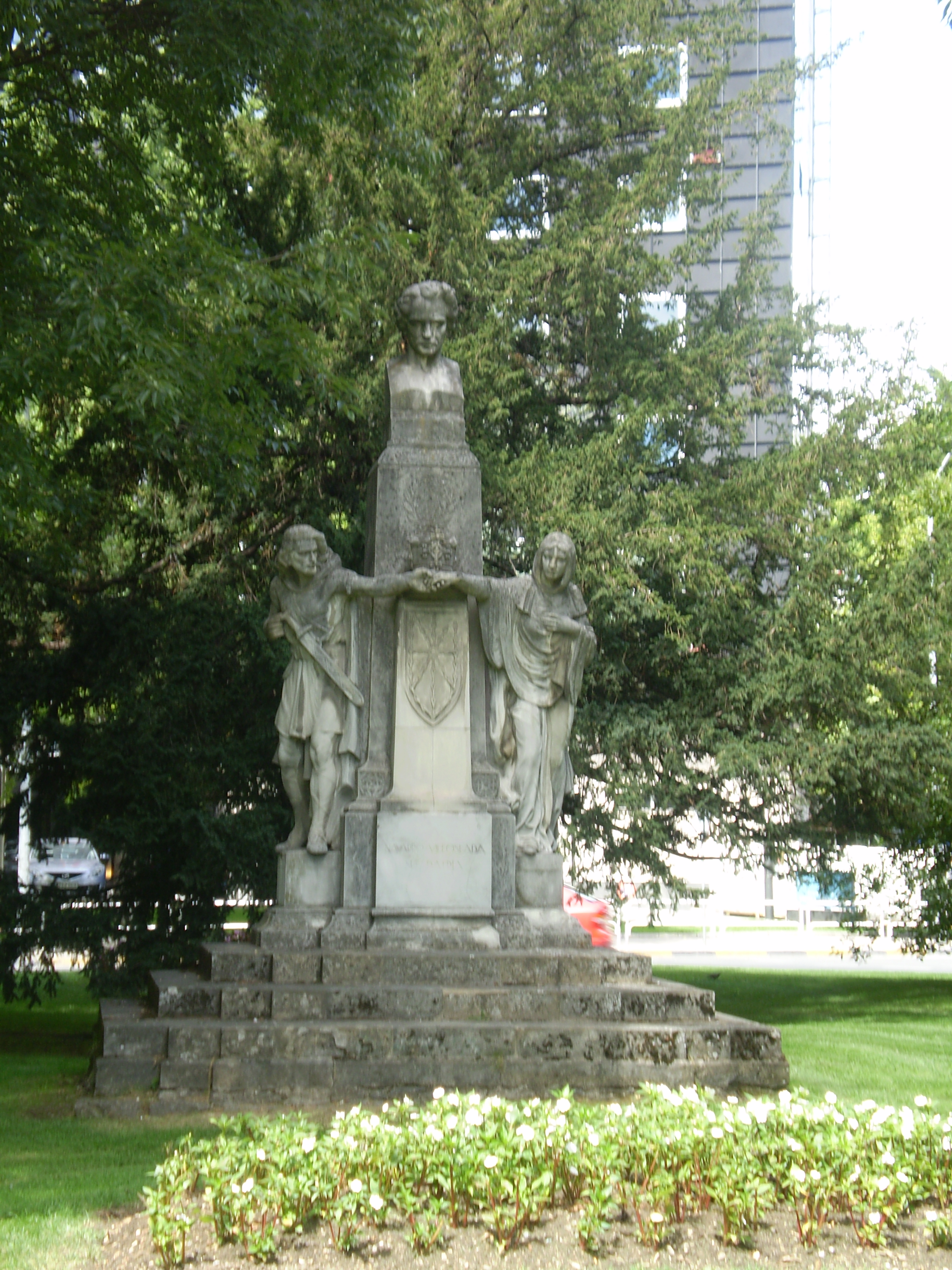 Monumento a Francisco Navarro Villoslada, escritor, político y periodista navarro nacido en Viana el 9 de octubre de 1818. Este monumento inaugurado en 1918 para conmemorar el centenario de su nacimiento, fue realizado por el escultor Lorenzo Coullaut. Sobre un pedestal aparece el busto del escritor y, a los lados, García Giménez y Amaya, dos personajes de su novela más famosa: "Amaya o los vascos en el siglo VIII". Los personajes unen sus manos. Debajo se ve el escudo de Navarra. Este monumento se encuentra situado en la ciudad de Pamplona (Navarra-España), en la rotonda de los cruces de las calles Navas de Tolosa, Avda. de Guipúzcoa y Yanguas y Miranda.